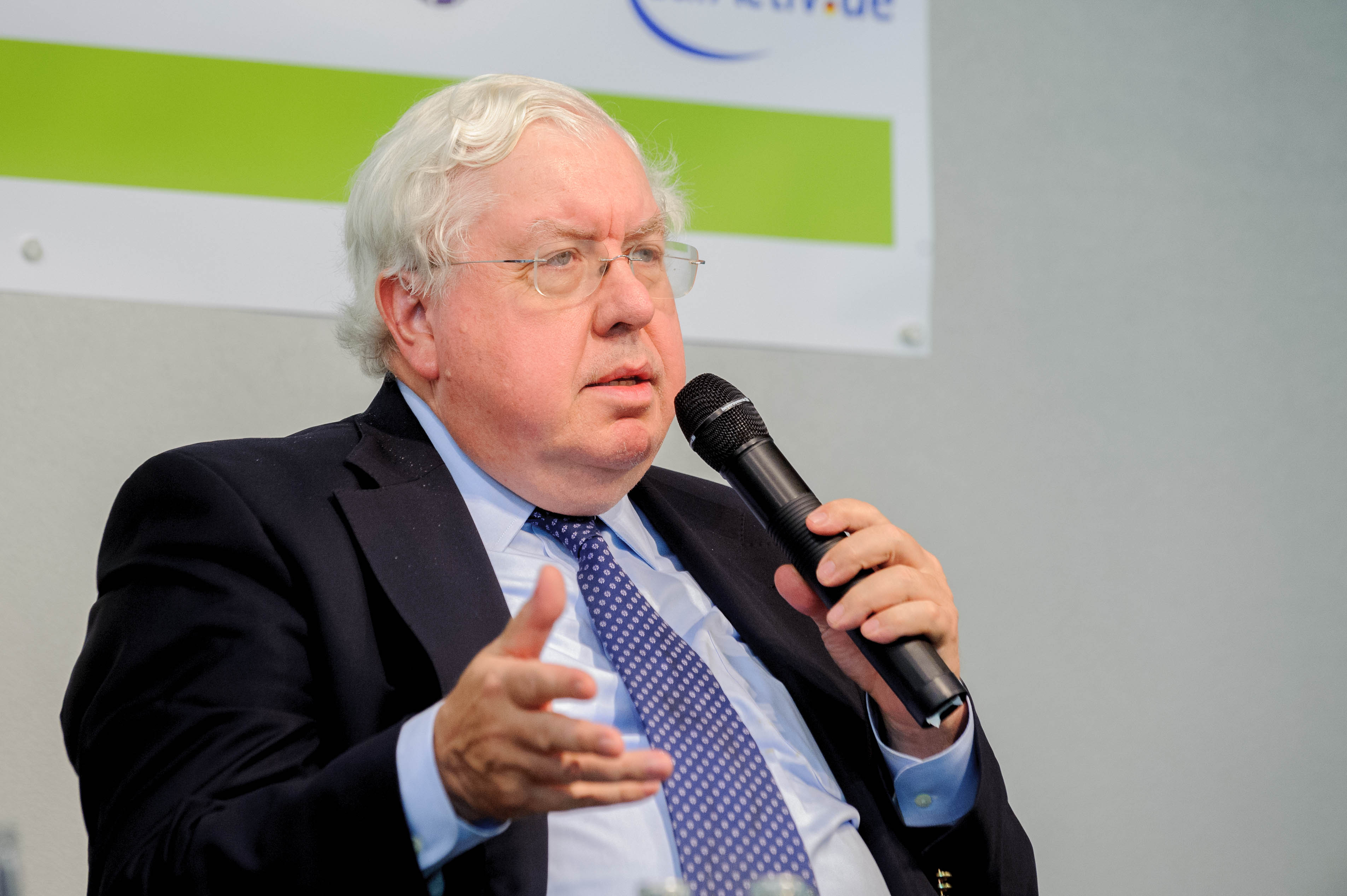 John Kornblum (ehemaliger US-Botschafter und Senior Counselor, Noerr LLP, Berlin) Konferenz: Europas gemeinsame Zukunft Foto: Stephan Röhl